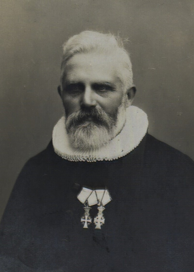 Søren Henrik Theodor Sørensen (1849–1929), provst på Færøerne, sognepræst i Skanderborg.